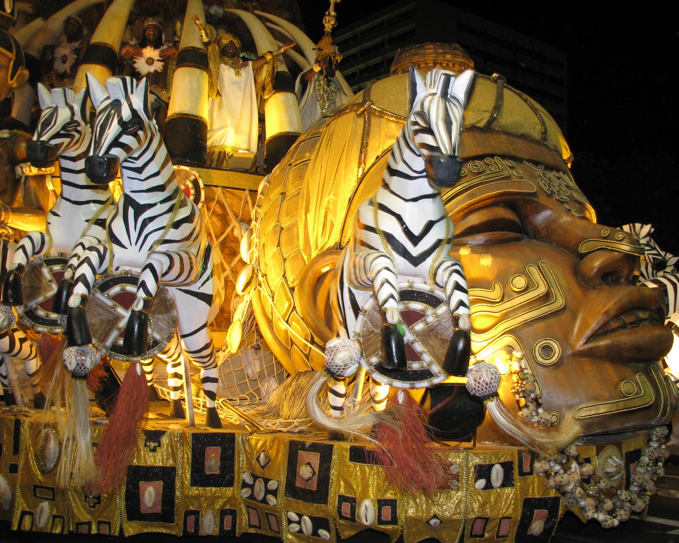 Carnaval 2010 Imperatriz Leopoldinense 27